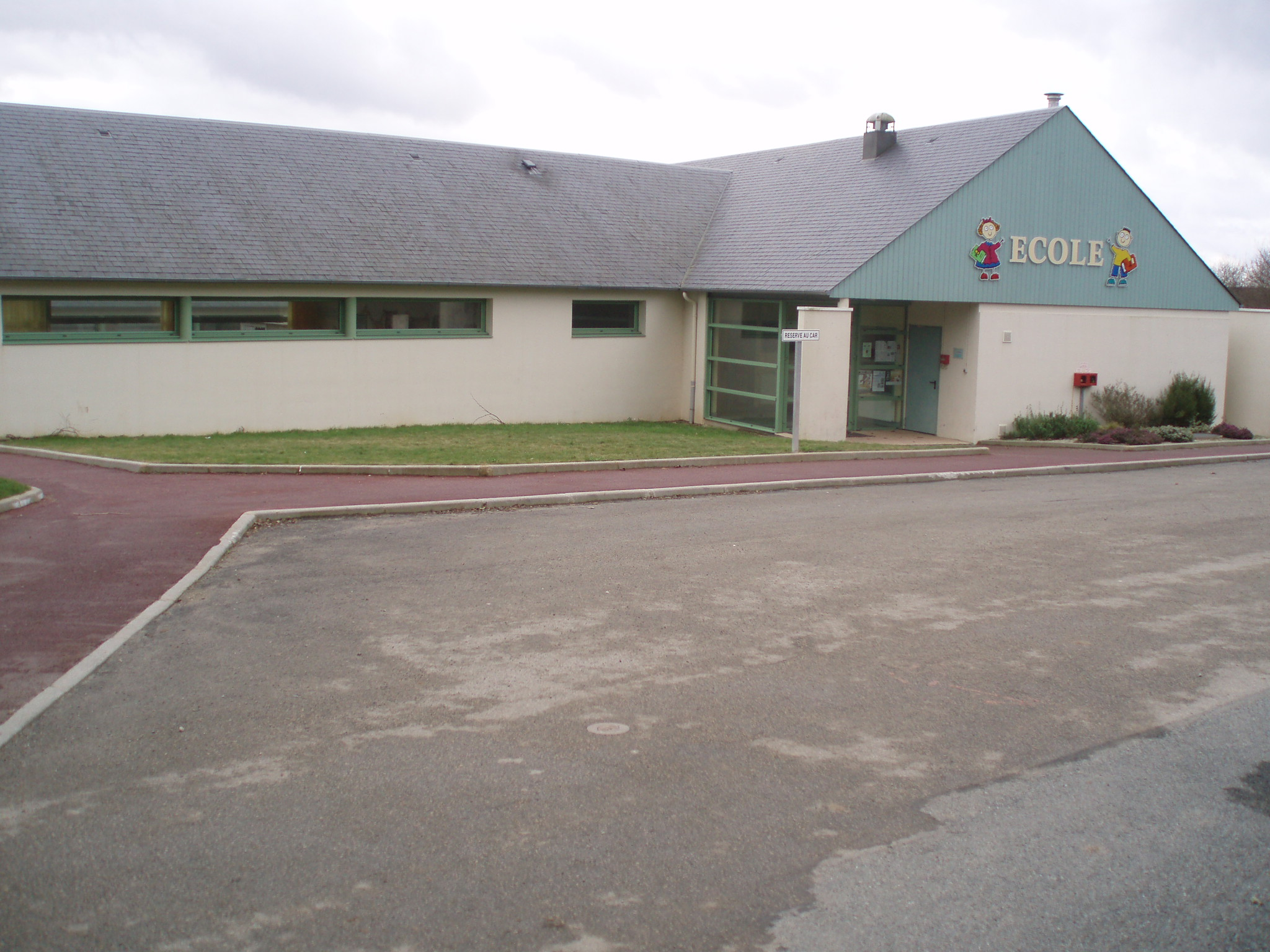 L'école de Loqueffret, vue d'ensemble avec parking